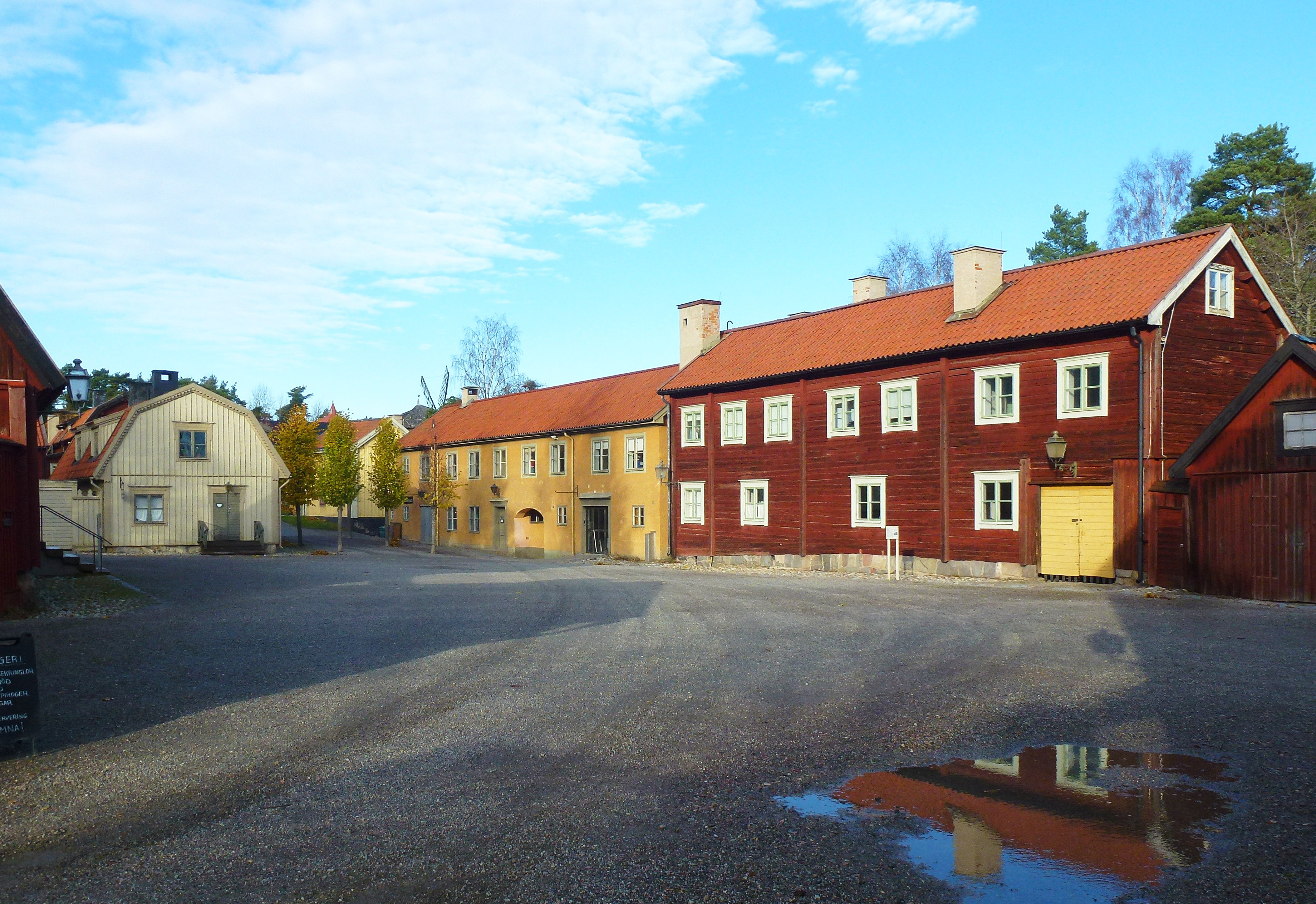 Tenngjutartorget med Wetterholmska gården